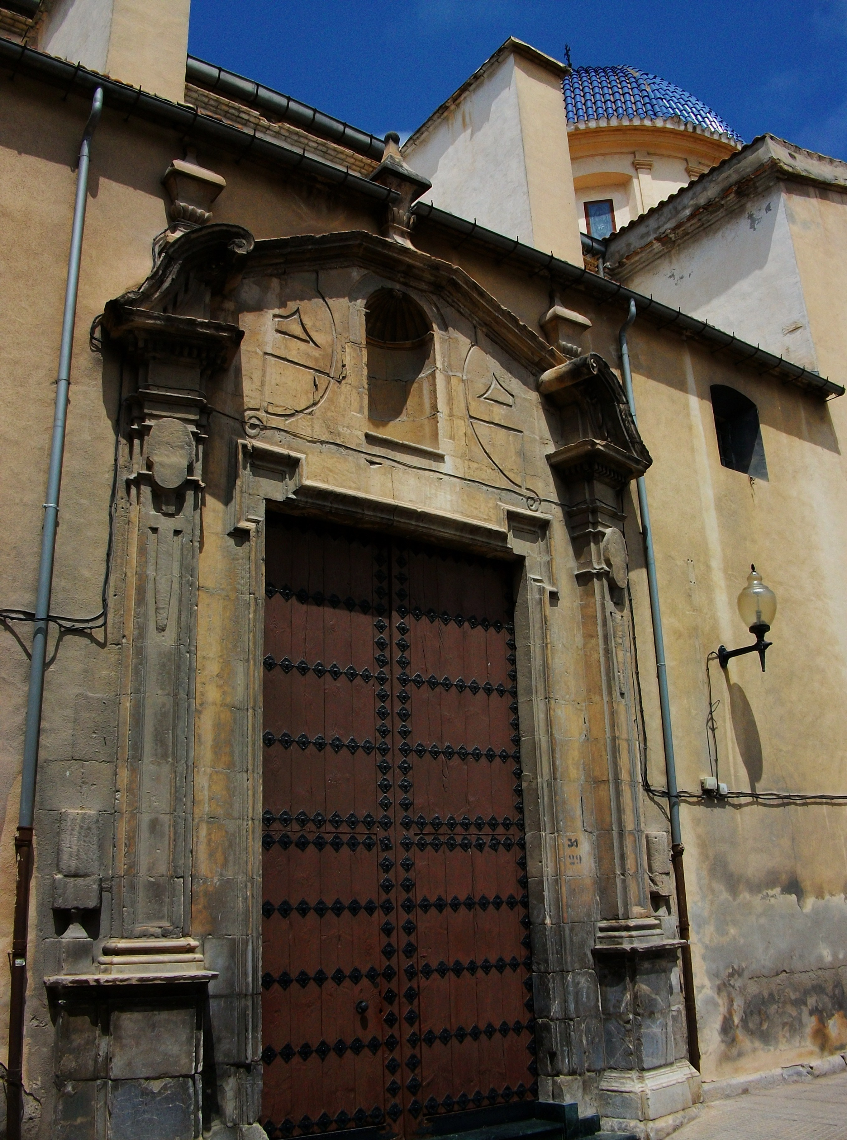 Portada del convent de sant Joan de la Penitència, Oriola.